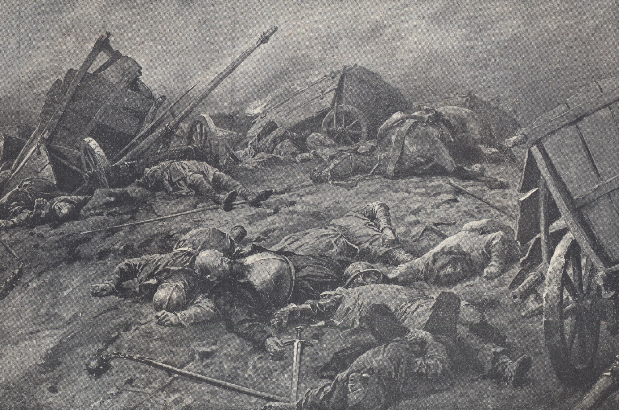 Mrtví bojovníci uvnitř vozové hradbě radikálů po bitvě u Lipan.